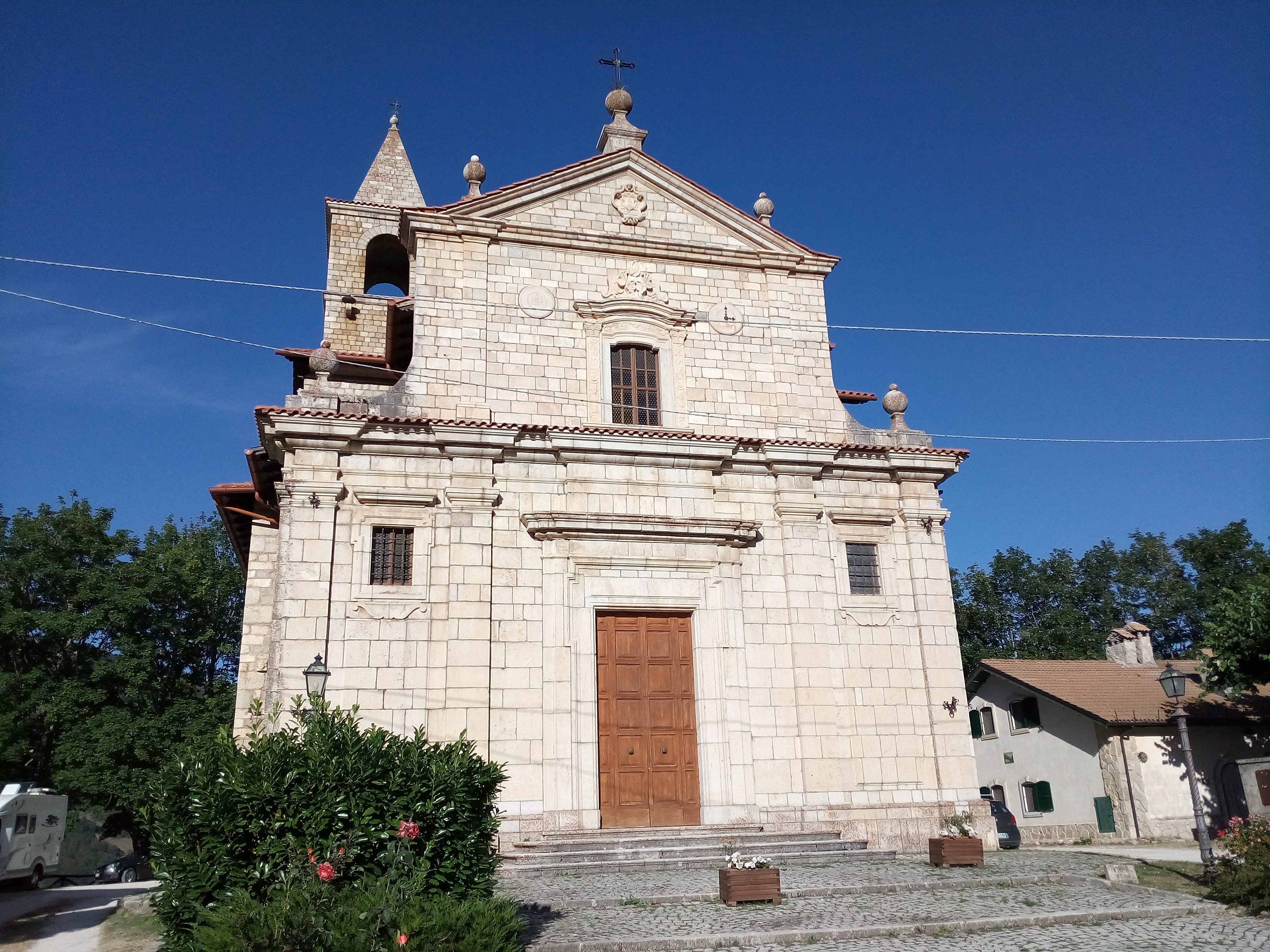 Chiesa di San Vincenzo, Gioia dei Marsi, Abruzzo